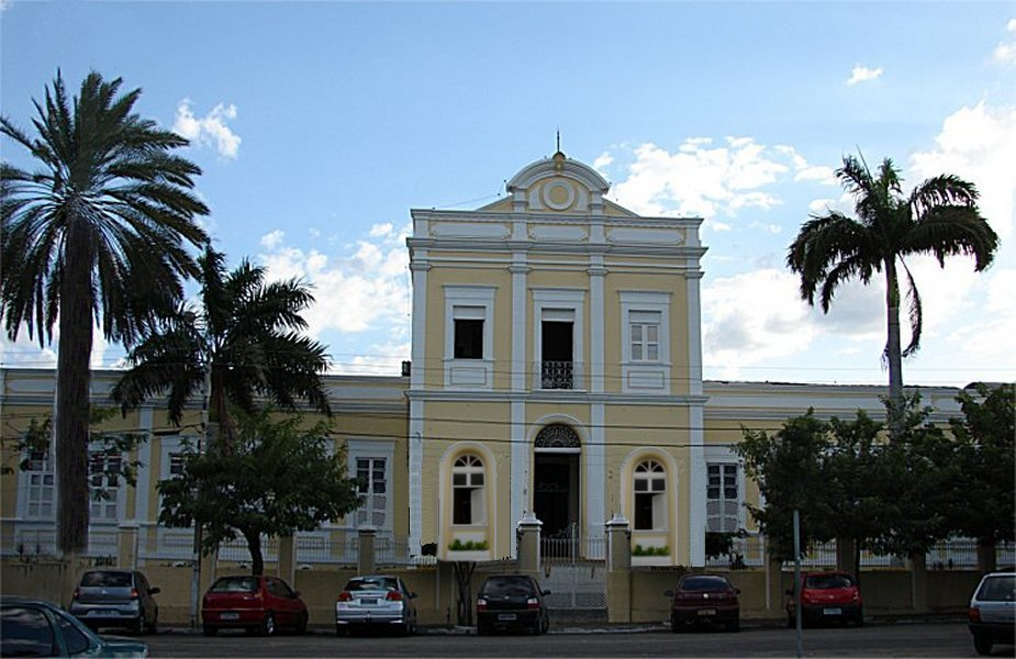 Fachada da Santa Casa de Misericórdia de Sobral (em dezembro de 2006), compõe o patrimômino histórico da cidade de [Sobral] no [Estado do Ceará].